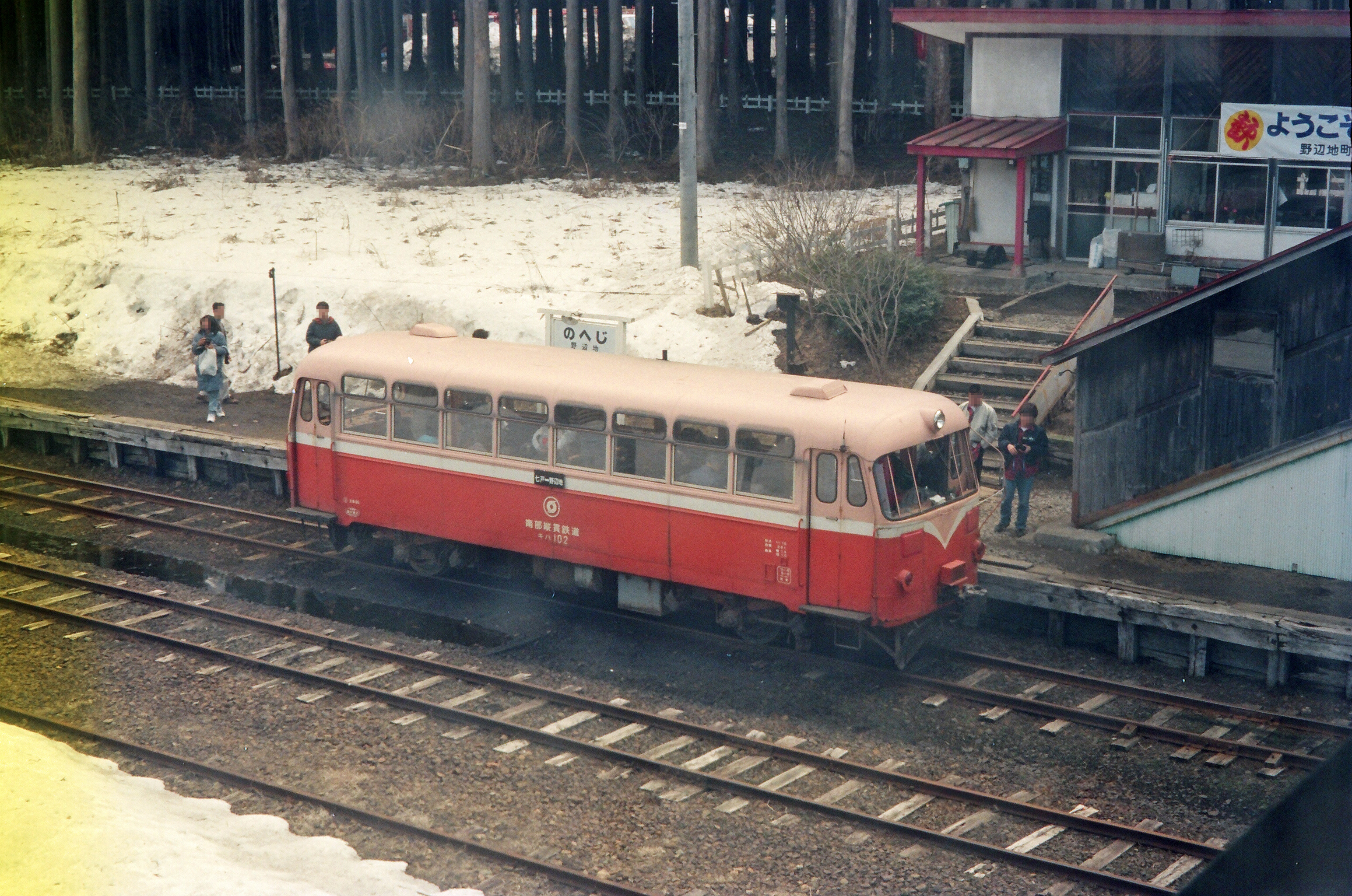 野辺地駅に停車中の南部縦貫線レールバス